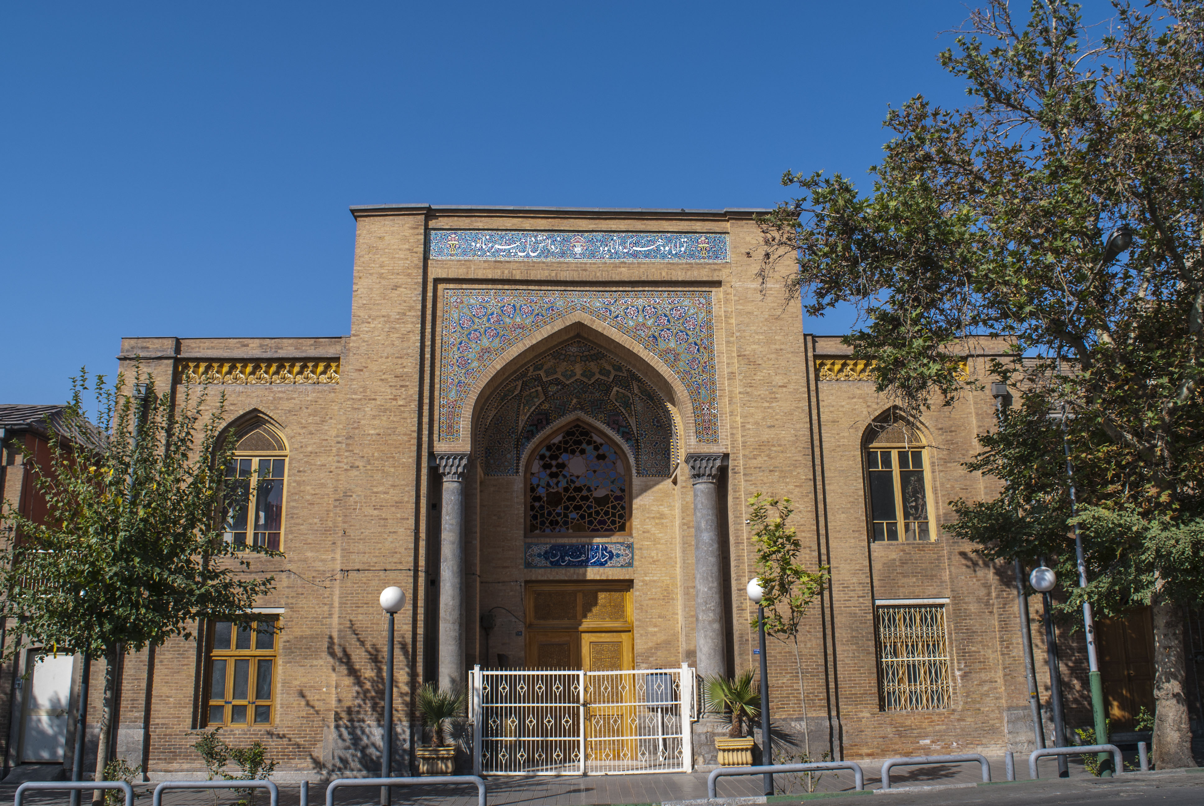 دارُالفُنون نام مدرسه متوسطه‌ای بود که به ابتکار میرزا تقی خان امیرکبیر در زمان ناصرالدین‌شاه قاجار برای آموزش علوم و فنون جدید در تهران تأسیس شد. دارالفنون را می‌توان نخستین دانشگاه در تاریخ مدرن ایران دانست. در نوشته‌های ایرانی، تا دیر زمانی همهٔ دانشگاه‌های خارجی را دارالفنون می‌خواندند.ساختمان دارالفنون در خیابان ناصرخسرو در مرکز شهر تهران جای گرفته‌است.